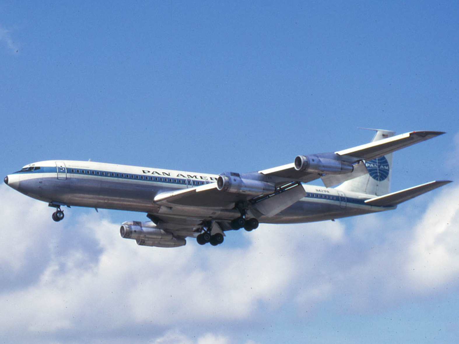 Miami 1968